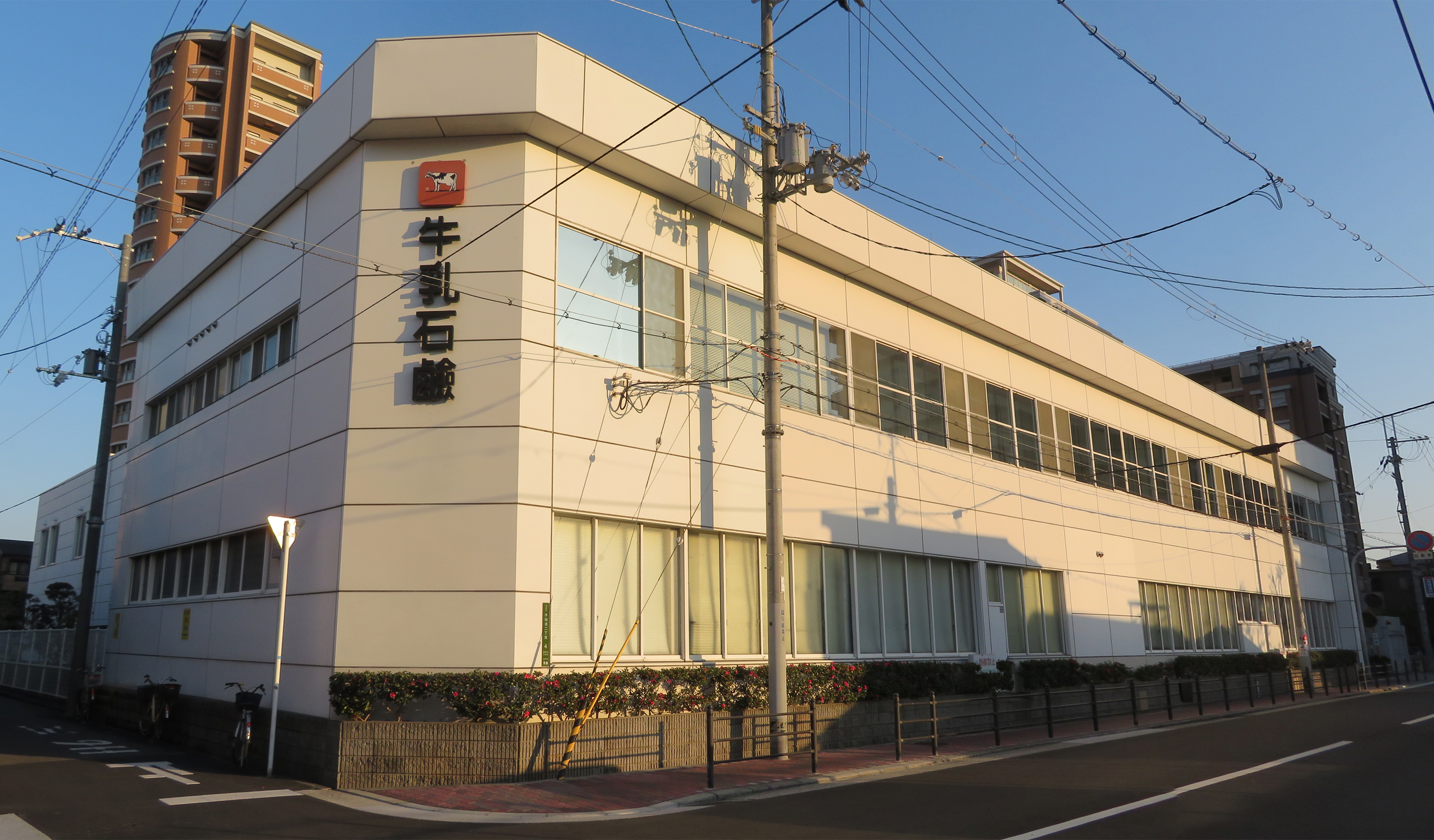 牛乳石鹸共進社株式会社本社を撮影。